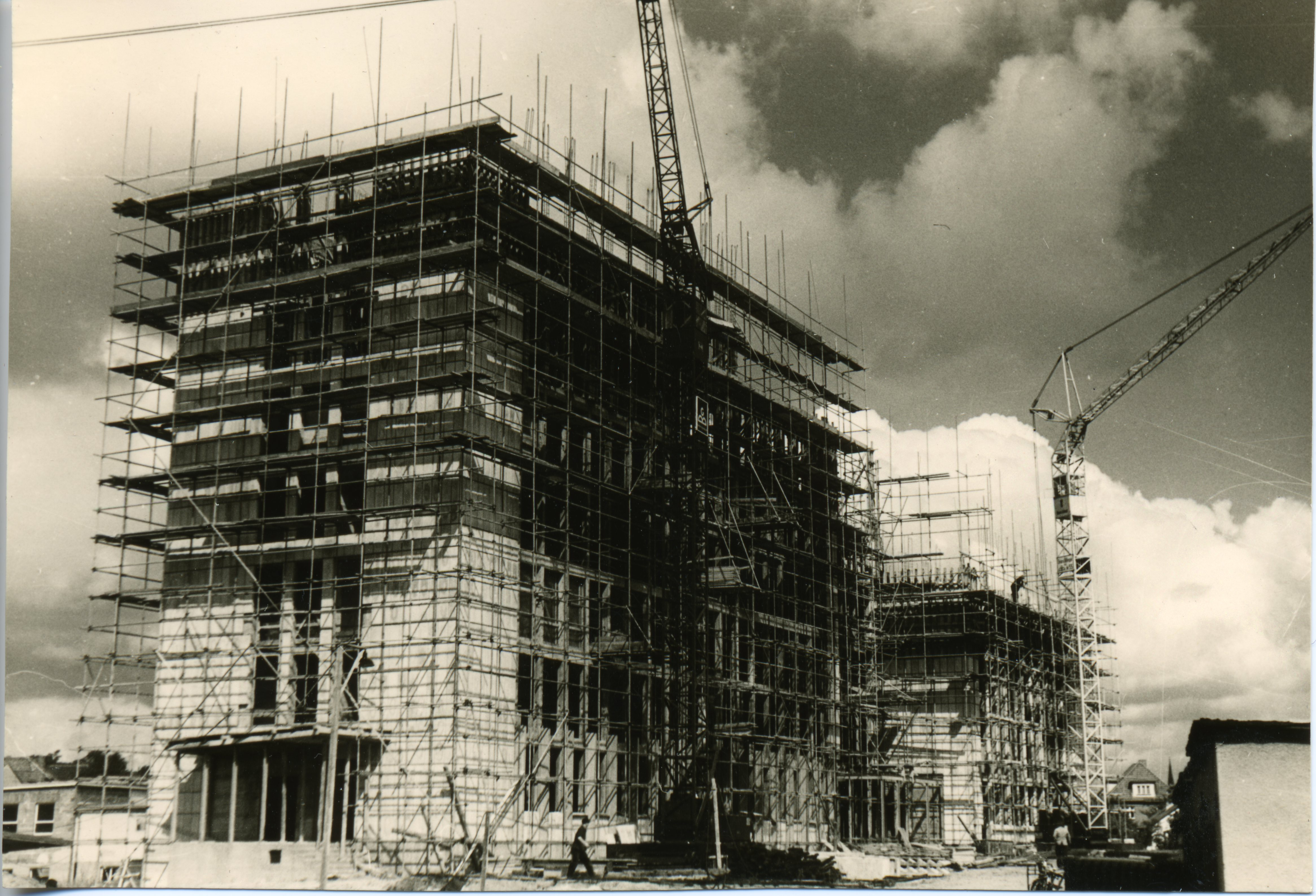 Architekturbüro Heinrich Wichmann, Celle. Mobil-Oil-Hochhaus in Bau, ca. 1957